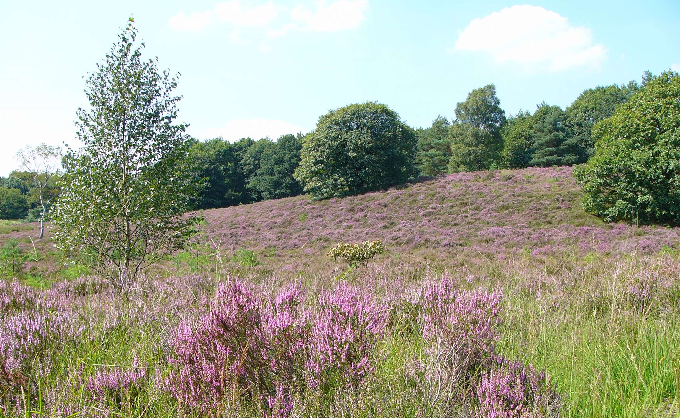 Heide im Naturschutzgebiet „Meinweg“ in Wegberg